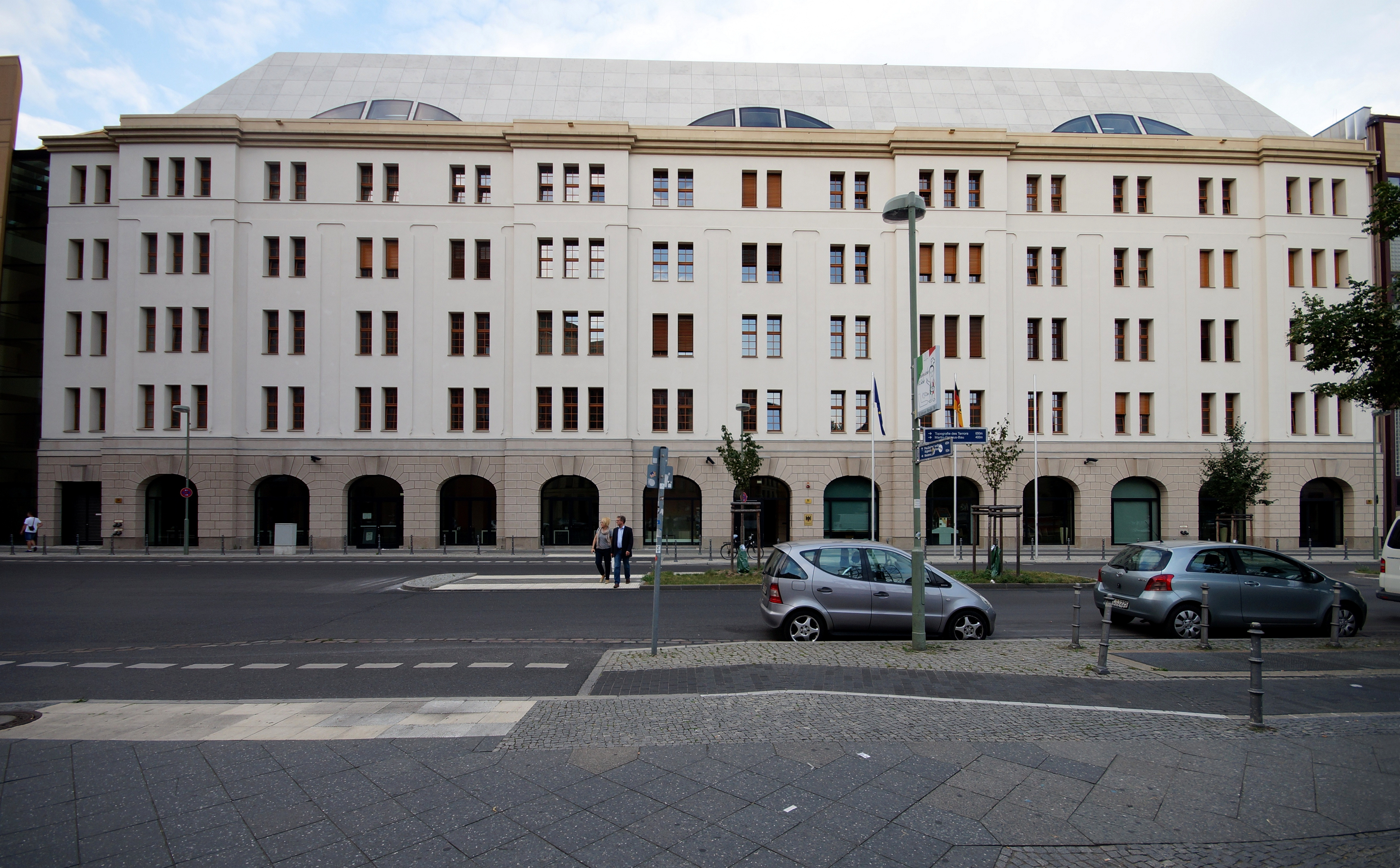 Die Fassade des denkmalgeschützten Gebäudes in der Stresemannstraße 128 in Berlin-Mitte